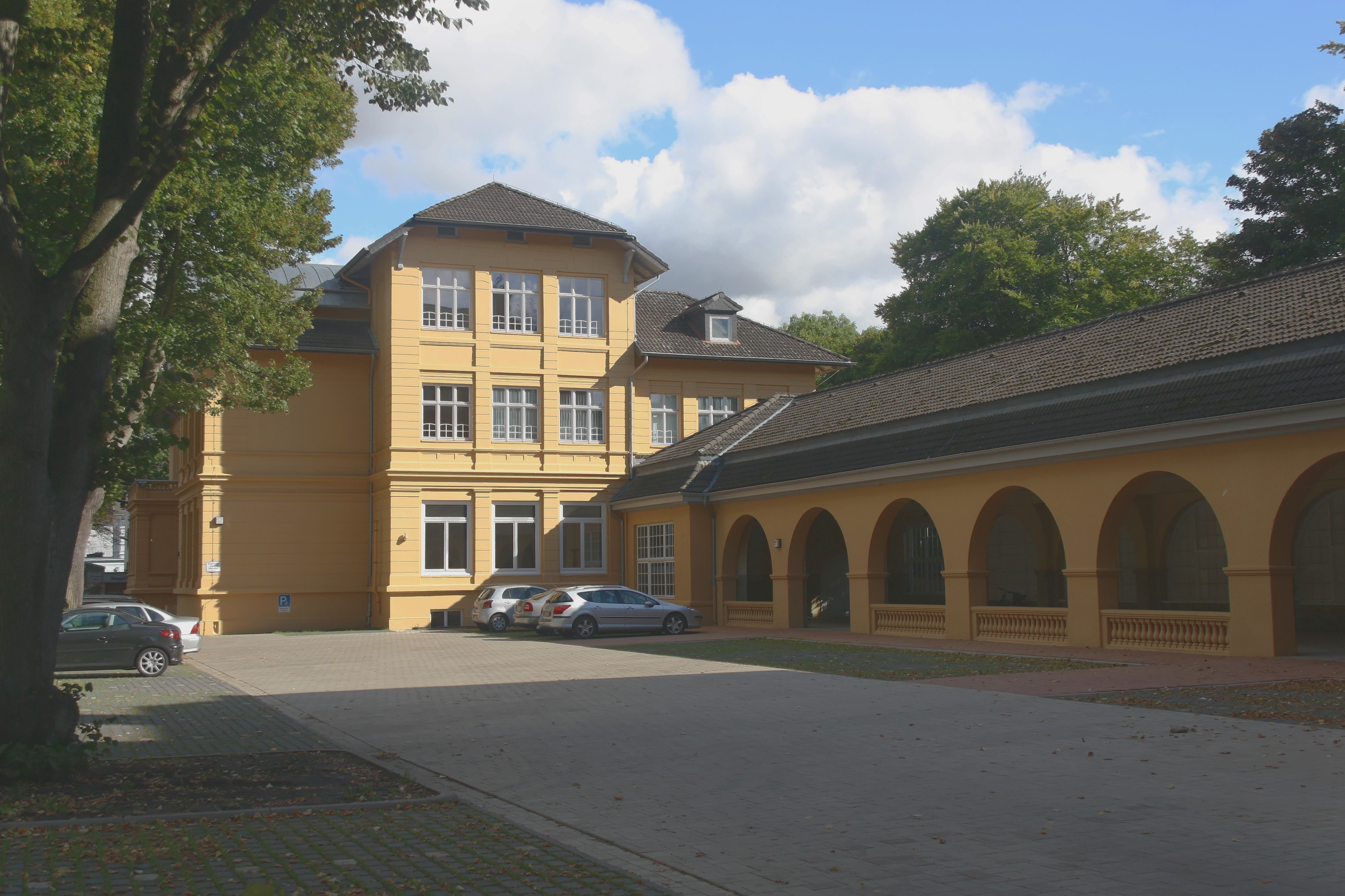 Hamburg, Groß Flottbek, Waitzstr 31, HofThis is a photograph of an architectural monument.